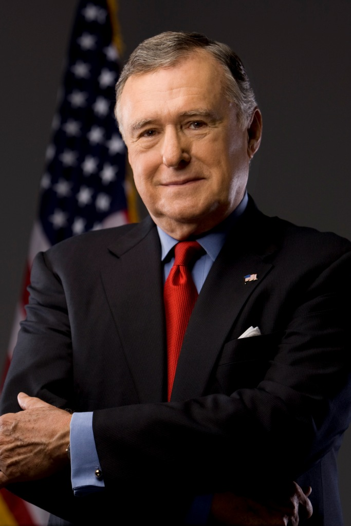 Maurice Ferre portrait in 2009